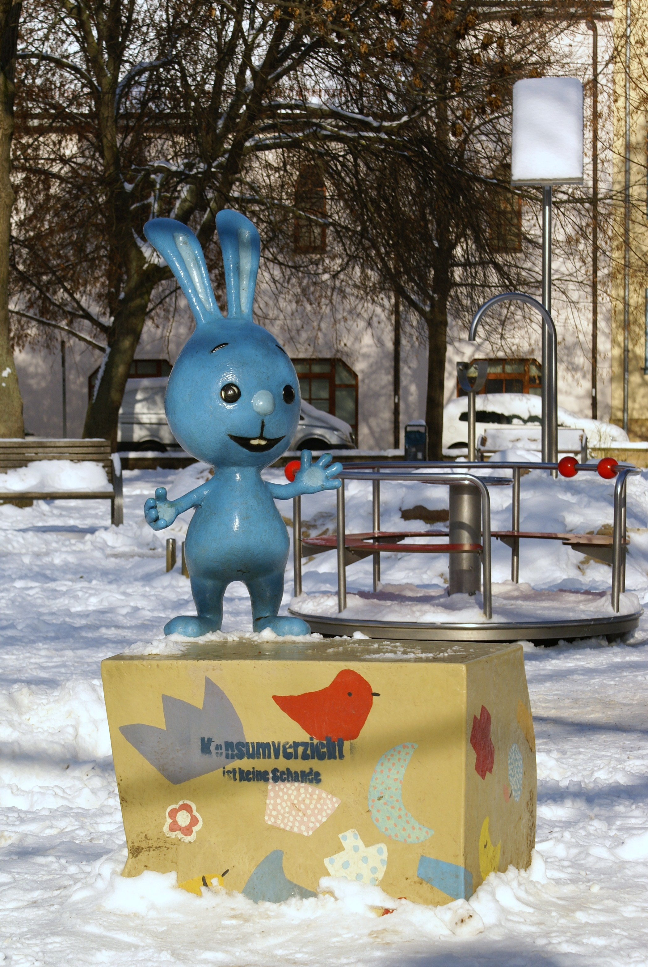 Kikaninchen-Skulptur am Spielplatz hinter der Krämerbrücke - Erfurt, Thüringen, Deutschland.